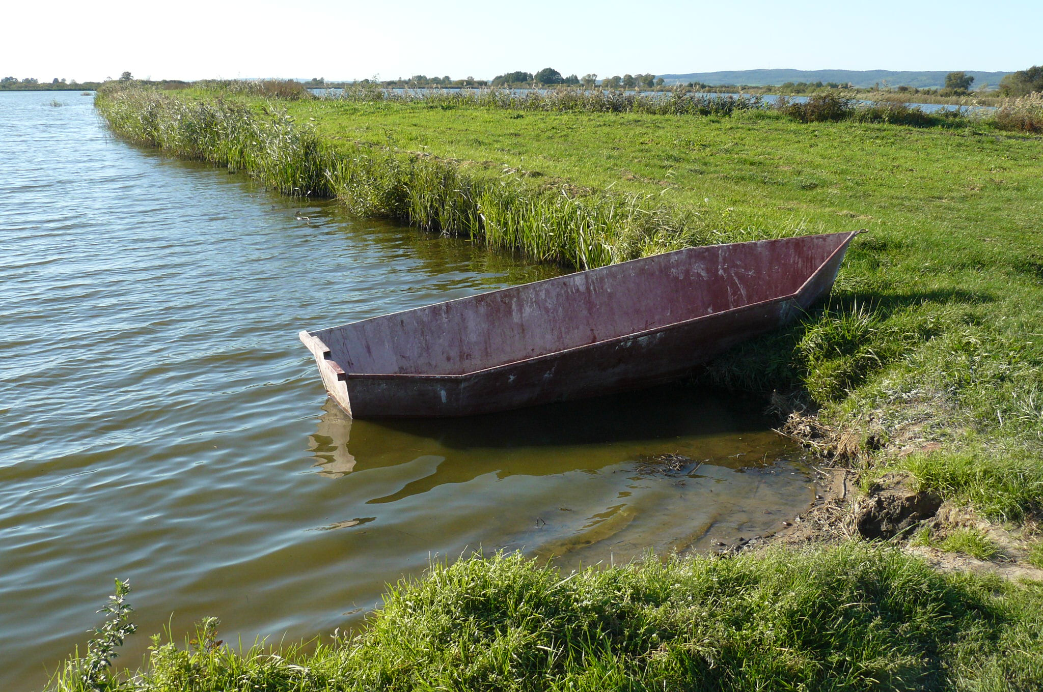 Noteć Valley (Osiek nad Notecią).